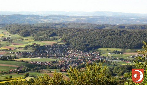 Blick von der Lägeren (Burghorn) auf Niederweningen (2004) mit Gemeindewappen unten rechts.